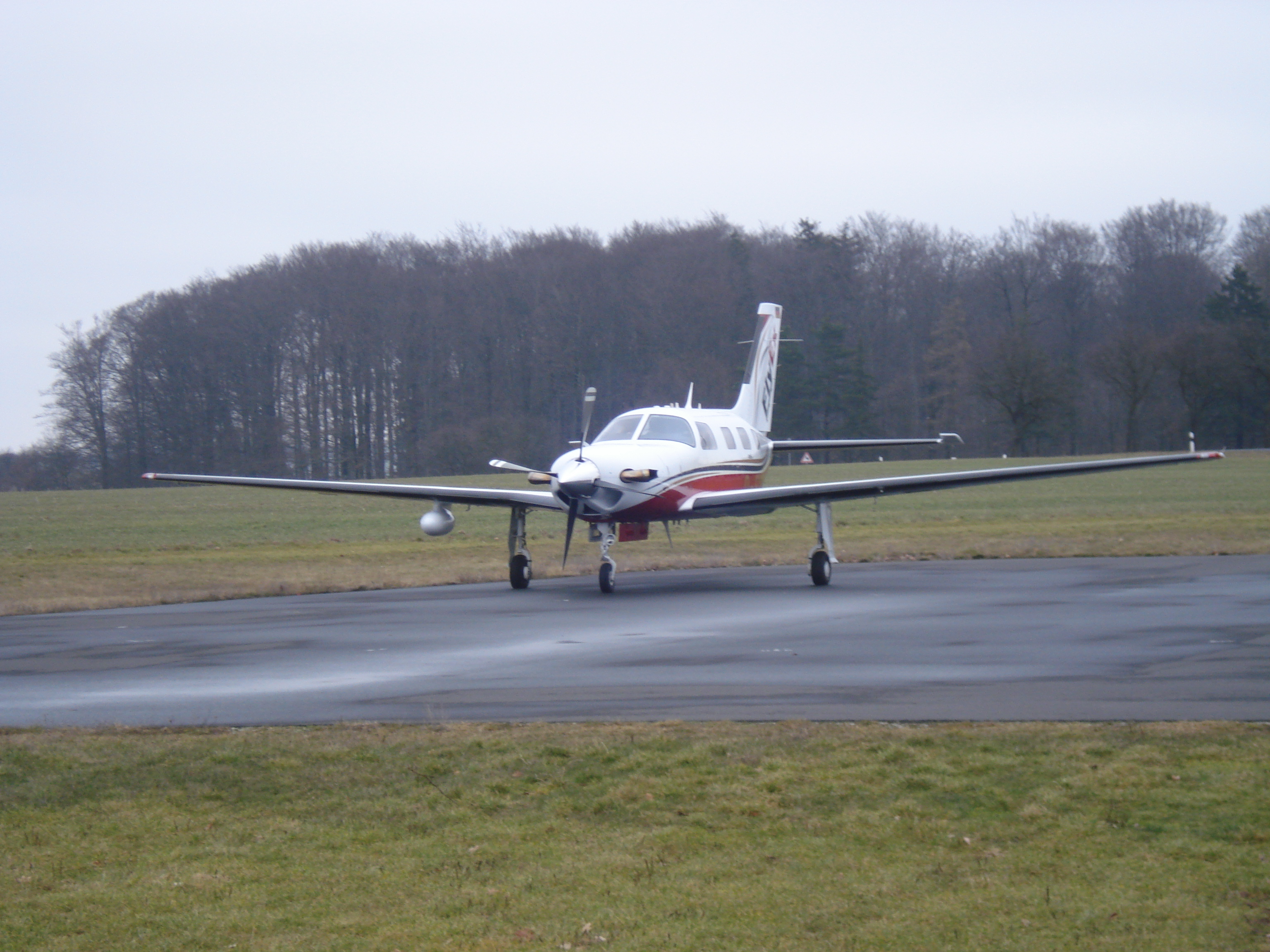 Piper PA-46 Malibu Meridian auf dem Flugplatz Günterode/Heiligenstadt